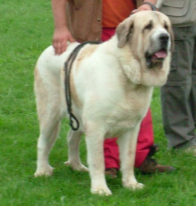 Mastino spagnolo